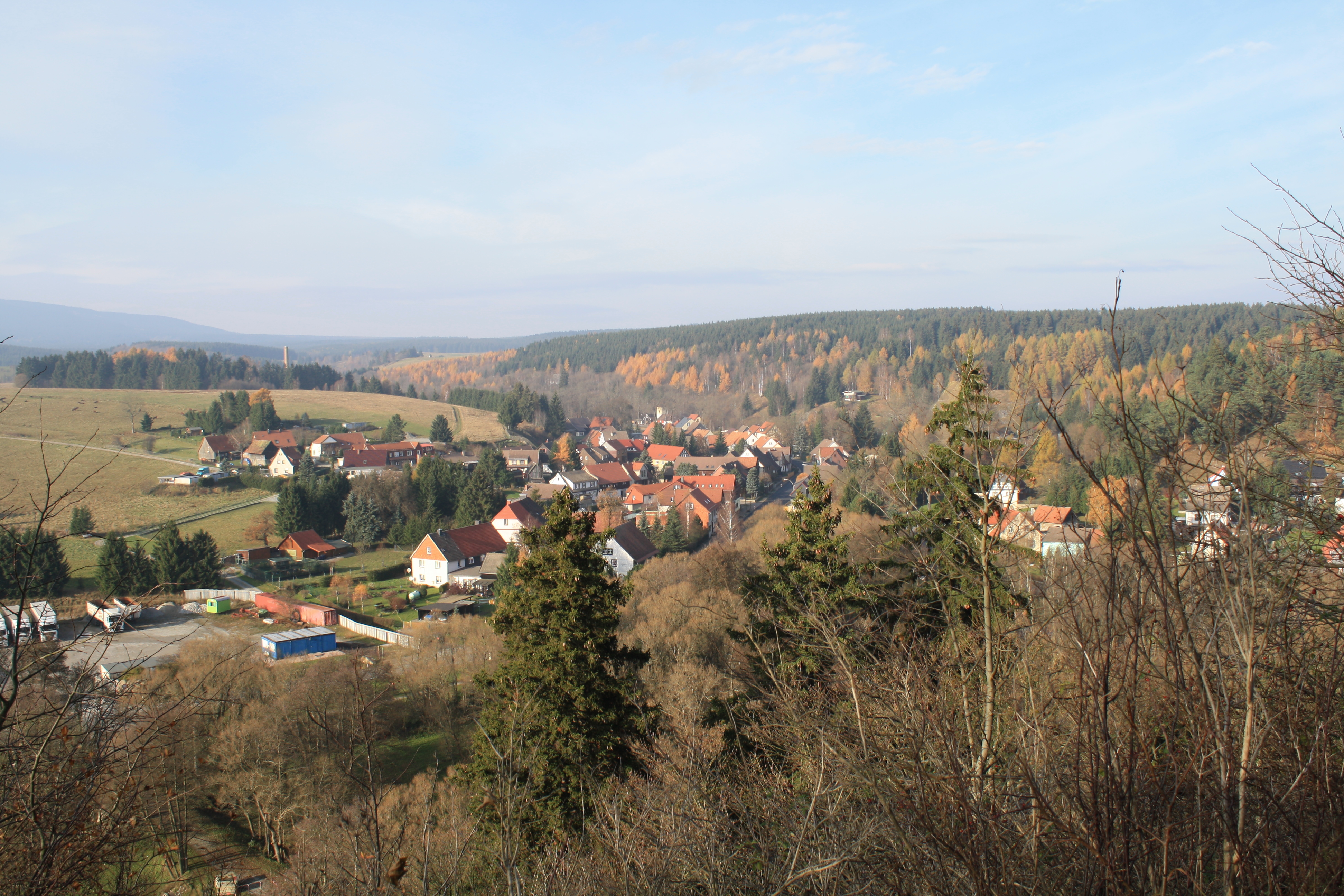 Königshütte von der Königsburg gesehen; Umgebung des Orts im Landschaftsschutzgebiet „Harz und Vorländer“ (LSG 32)